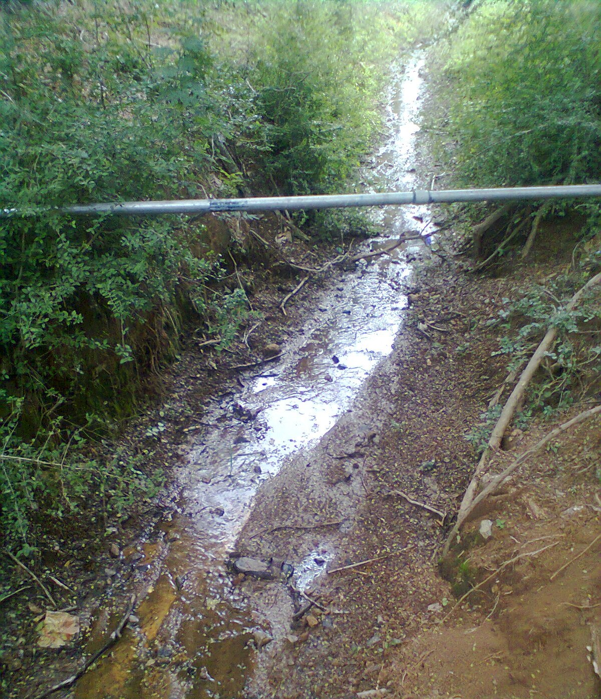 A small perennial flow of water, அசும்பு, வற்றாத நீர்க்கசிவு. The photo is my own shooting at Vandalur.